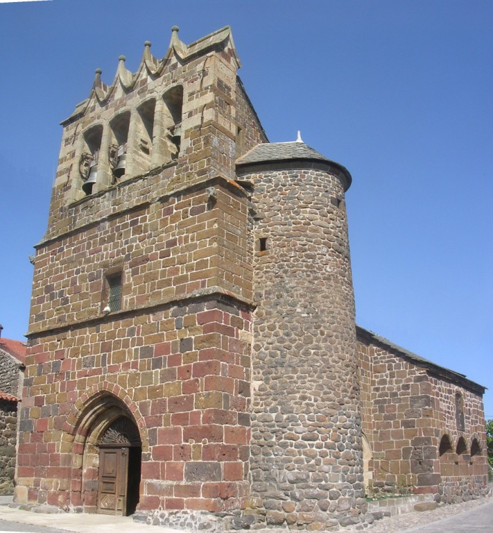 Eglise de St Christophe sur Dolaison (43)